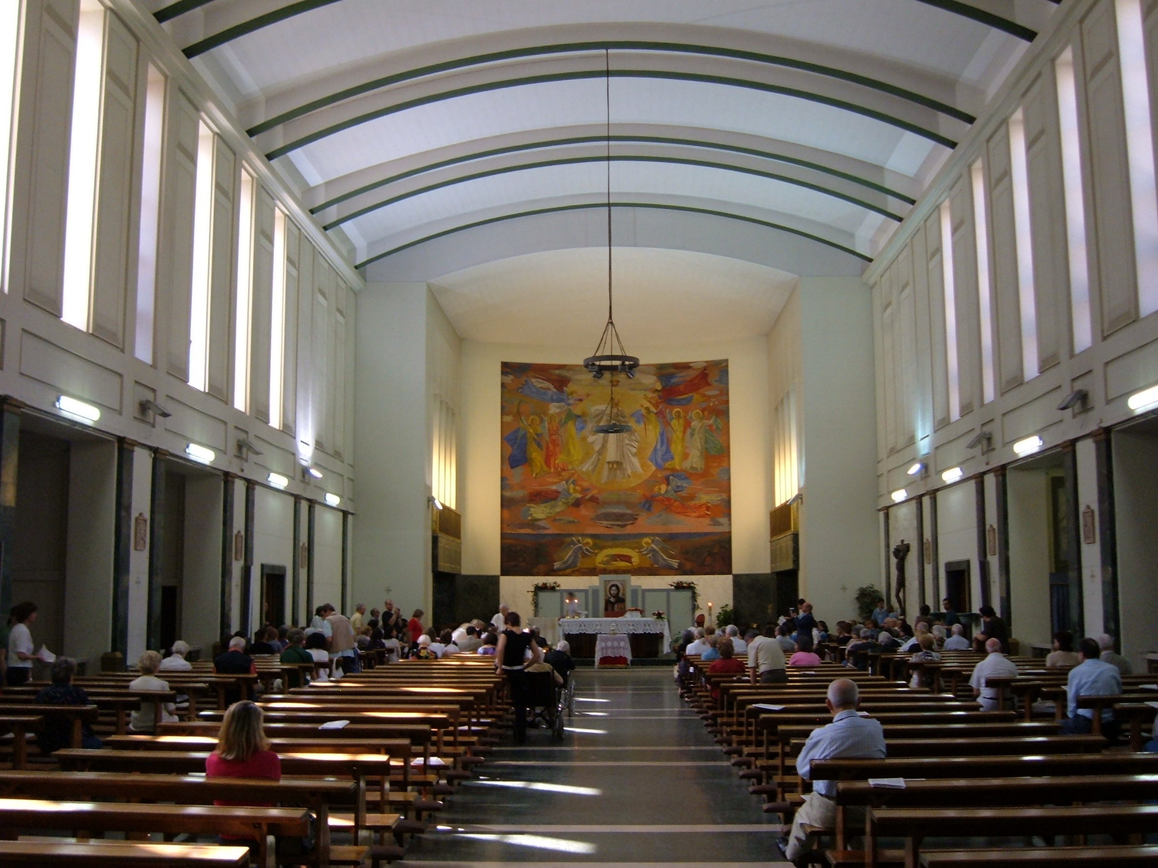 Chiesa di Santa Maria Goretti, a Roma, nel quartiere Trieste.